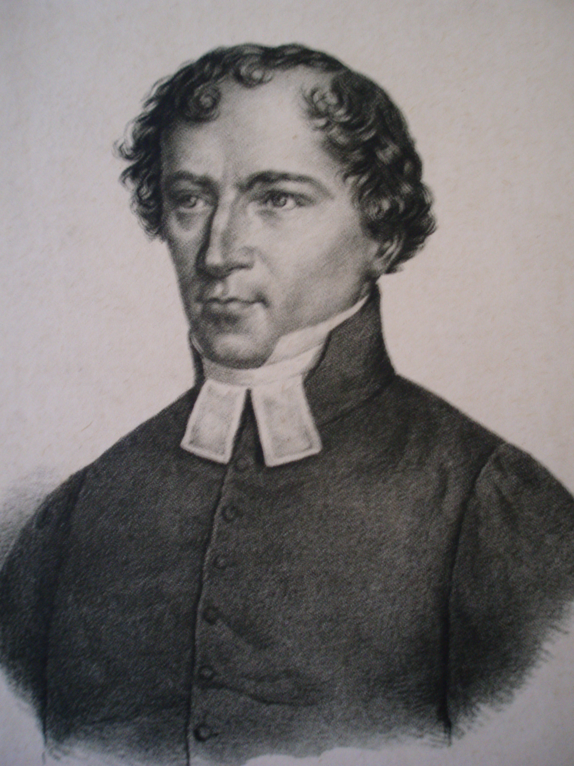 spisovatel Jan Kollar